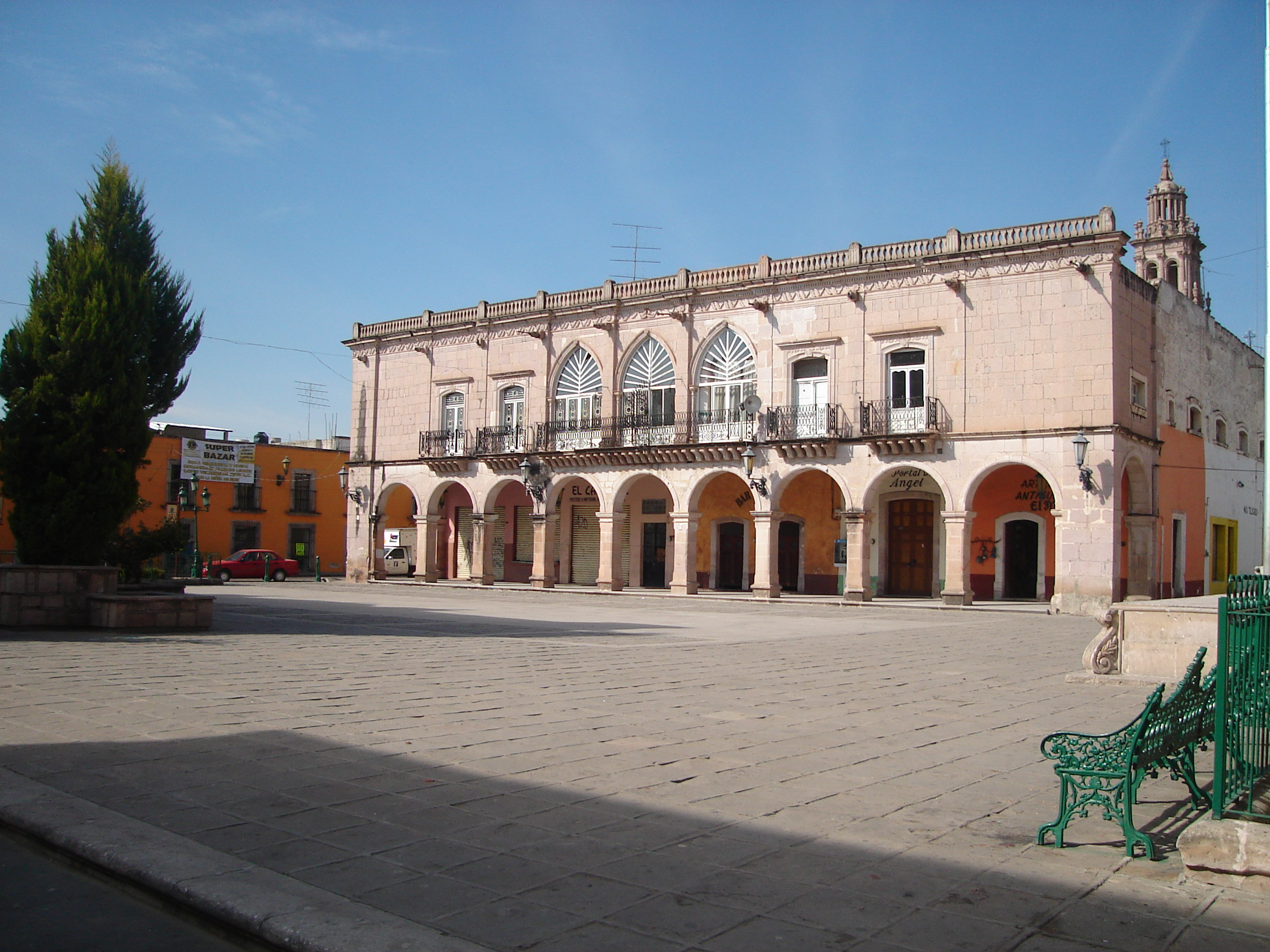 Plaza Tacuba, Jerez de García Salinas, Zacatecas